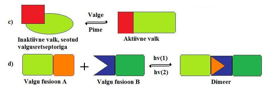 Joonis 3